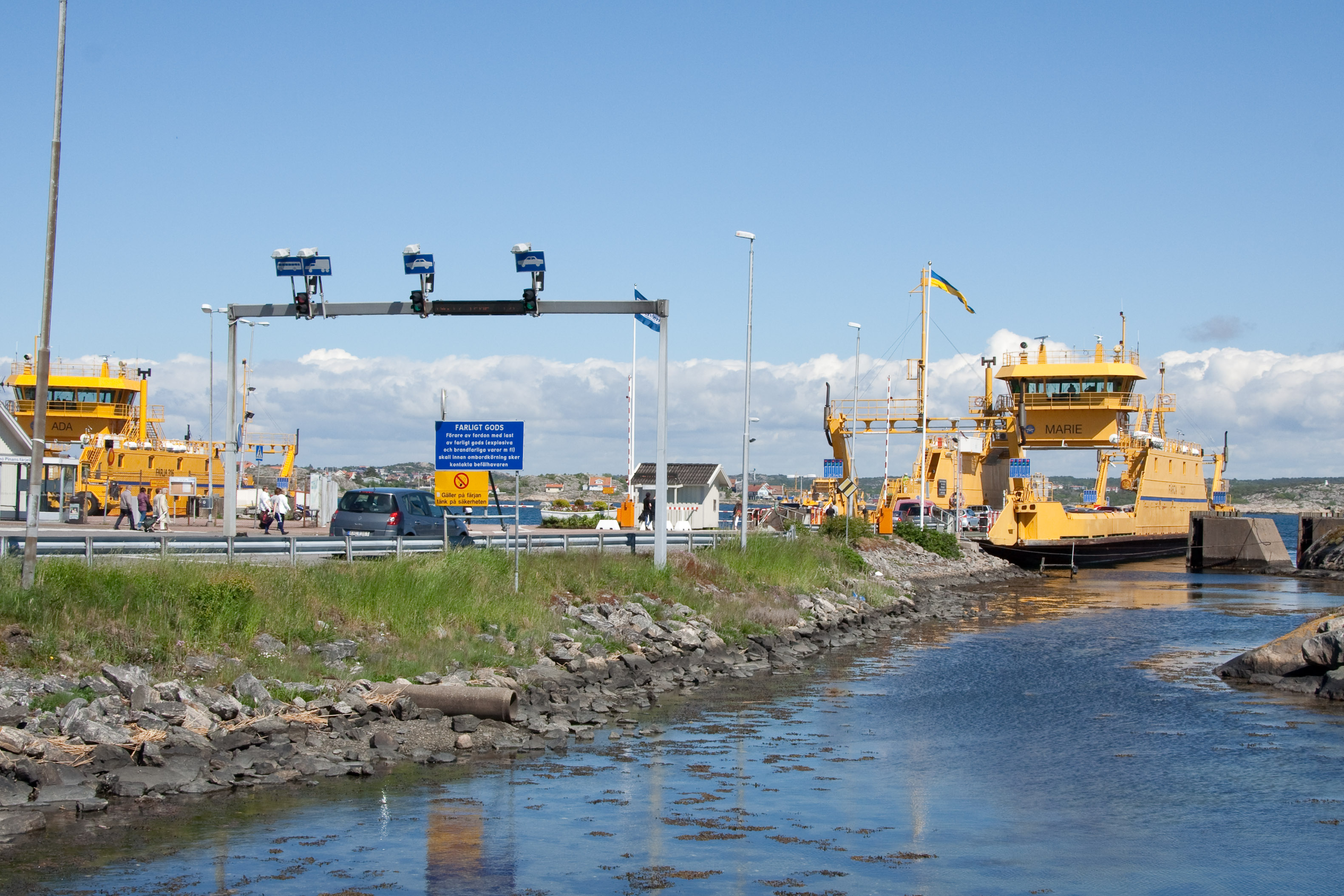 Hönö Pinans Färjeläge och två av ledens färjor vid läget